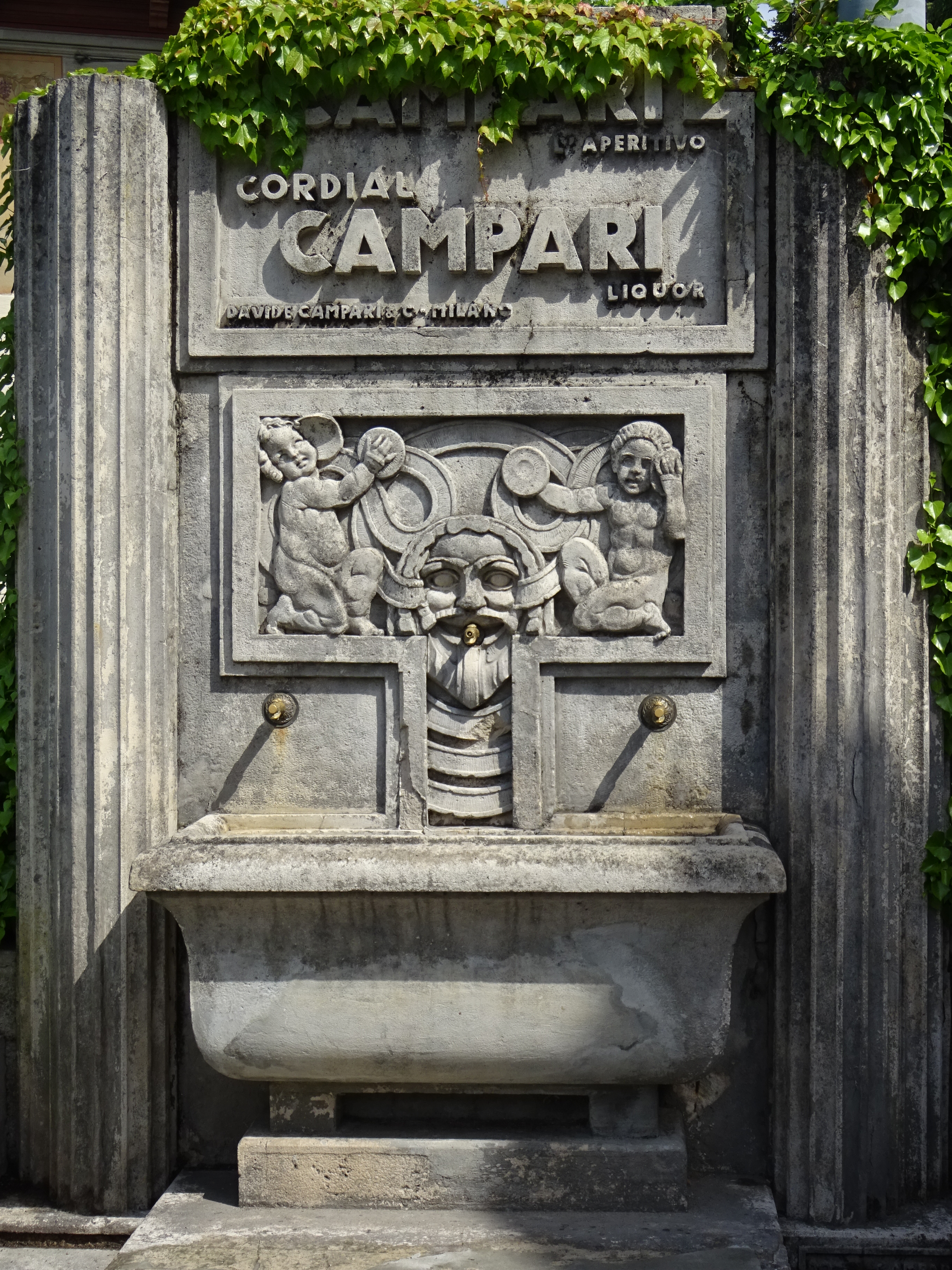 Fontana del Campari This is a photo of a monument which is part of cultural heritage of Italy.